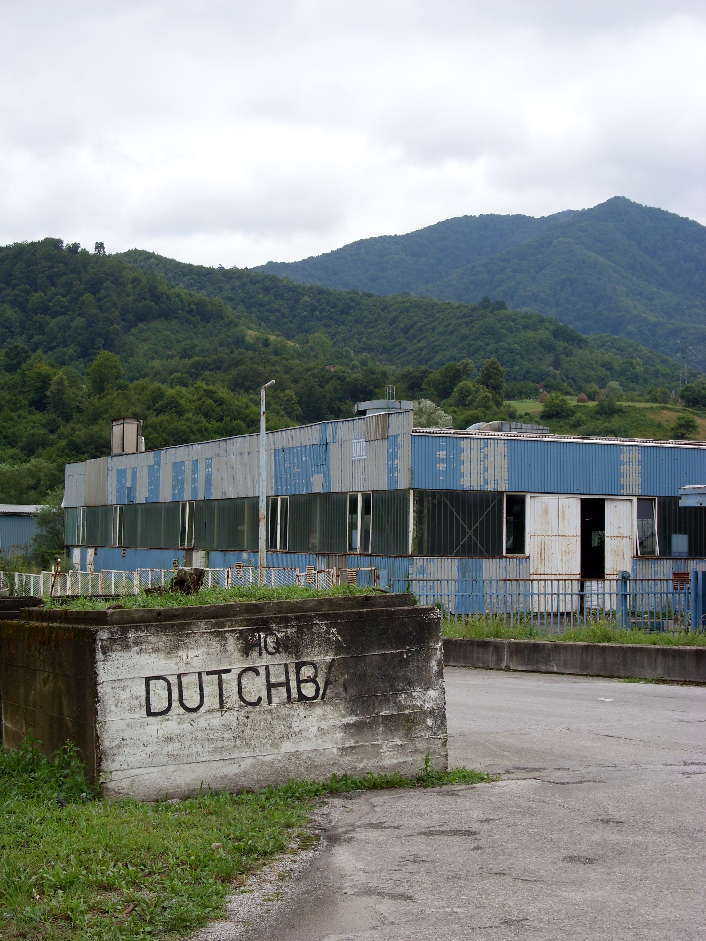 Auf dem Gelände des UNPROFOR-Hauptquartiers suchten im Juli 1995 Tausende Einwohner von Srebrenica Zuflucht vor den Truppen von General Mladić.